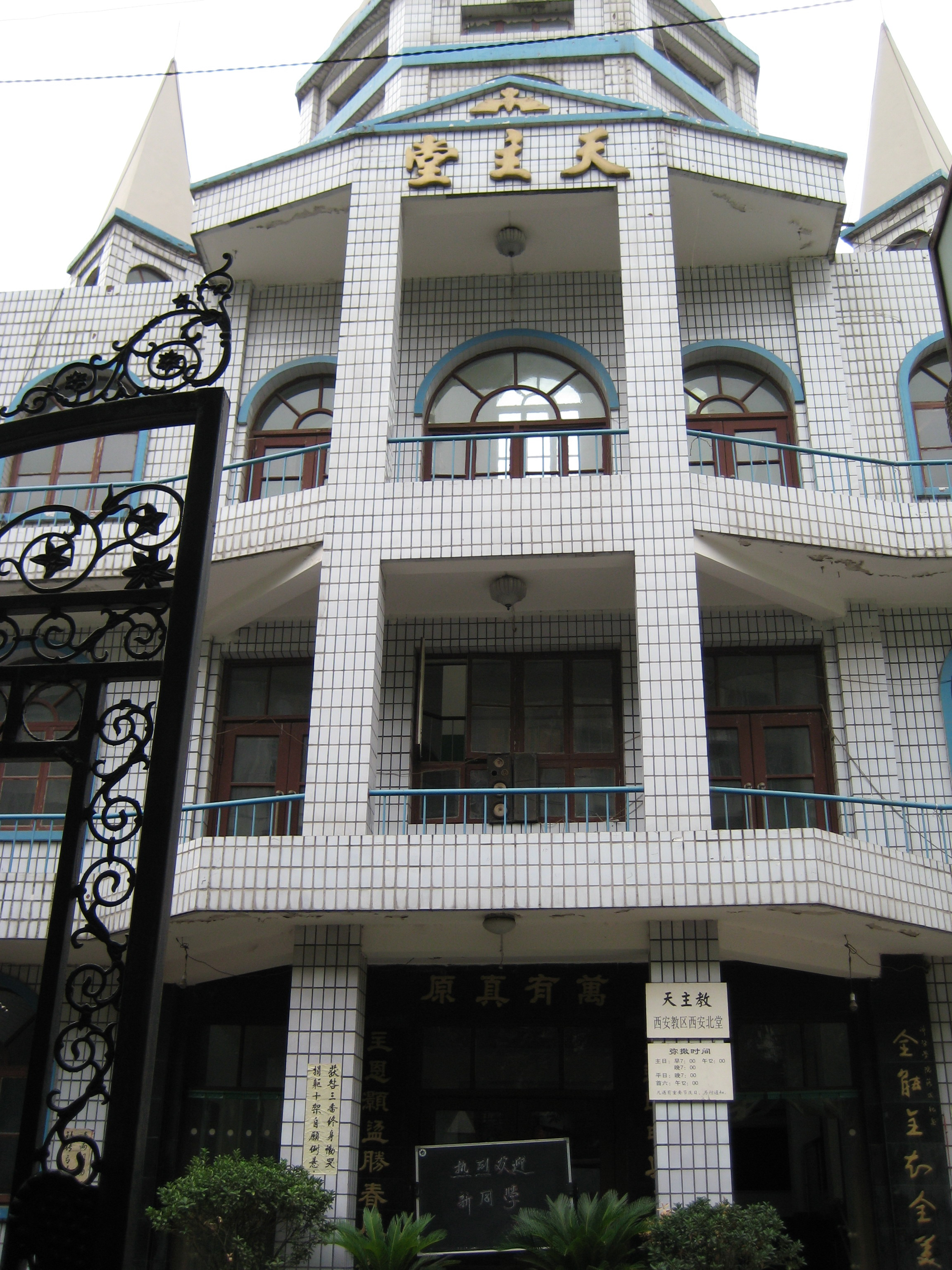 陕西西安教区北堂,摄于2008年7月22日